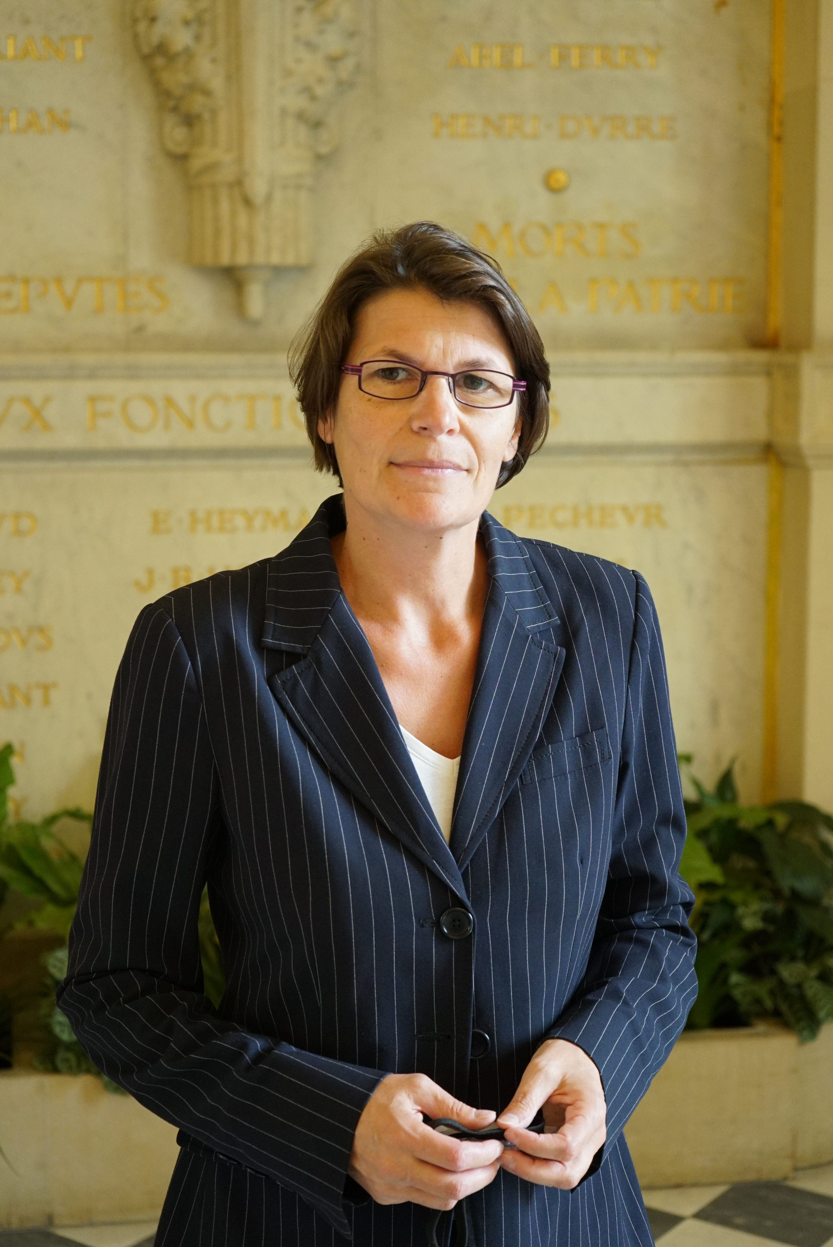 la députée au palais Bourbon.